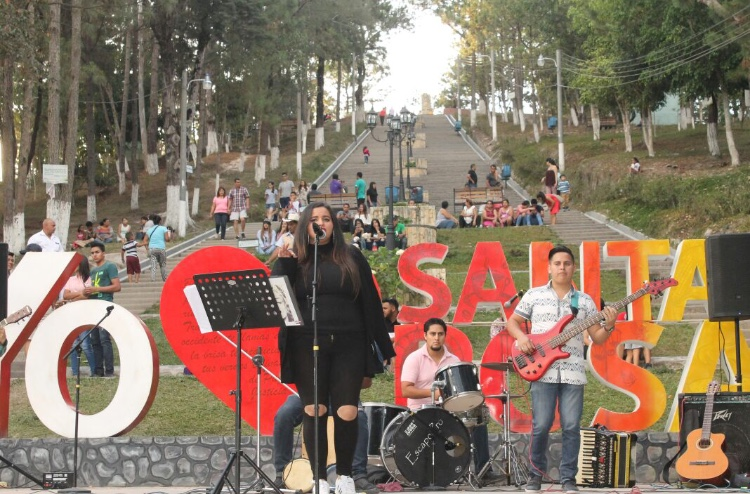 Grupo musical "Grito Fuerte"